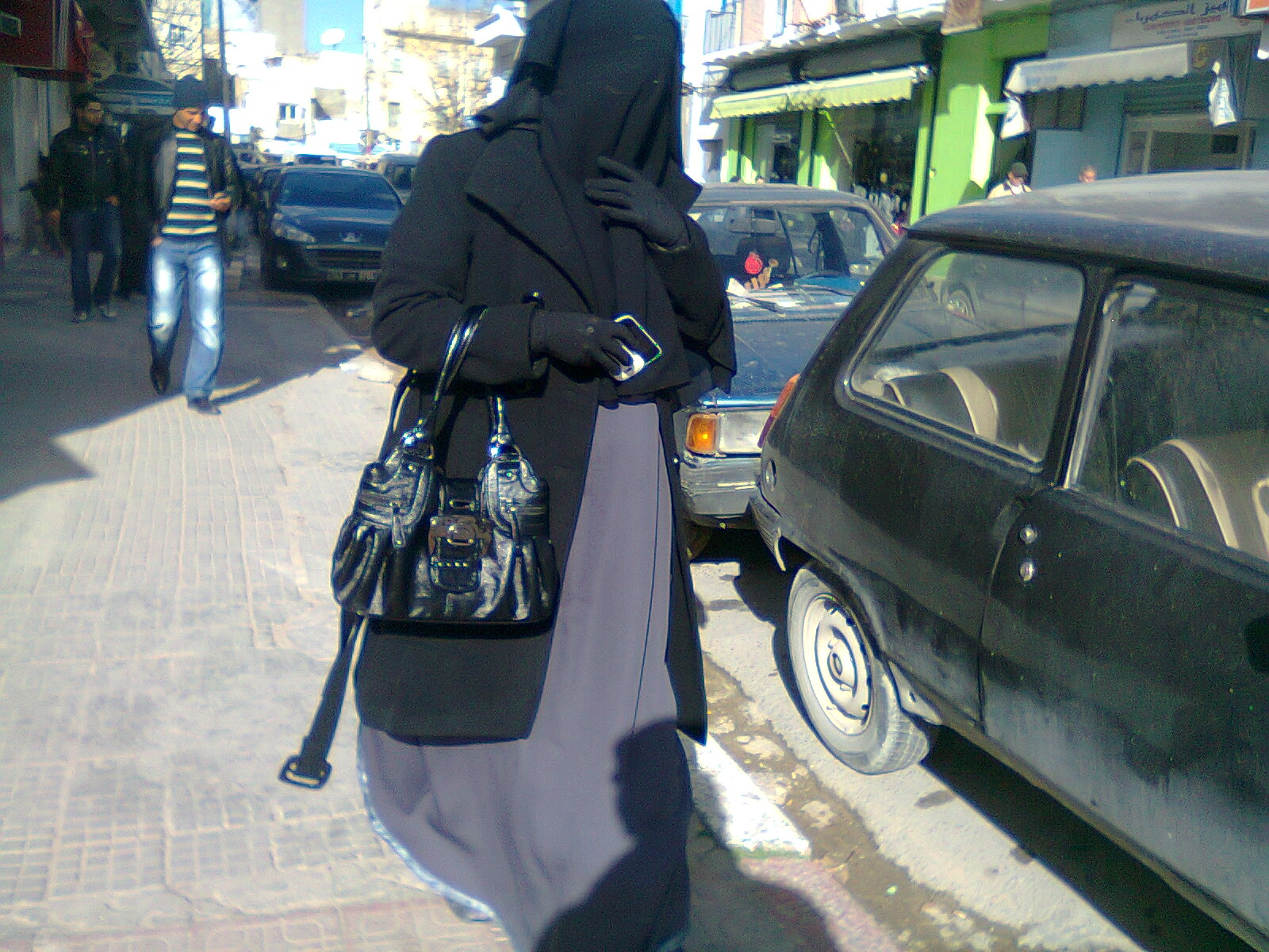 Une femme portant le niqab dans les rues de Bizerte au nord de la Tunisie.